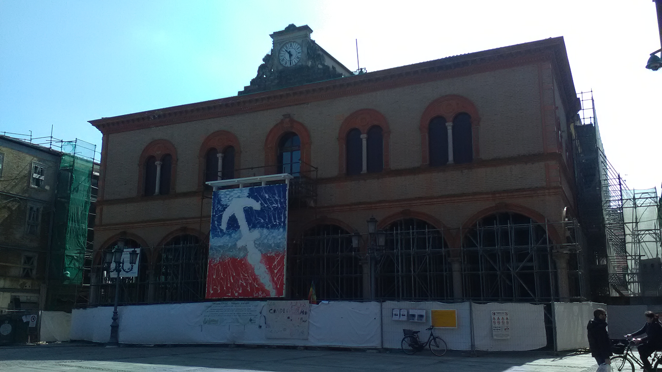 Il palazzo municipale di Mirandola nel marzo 2016